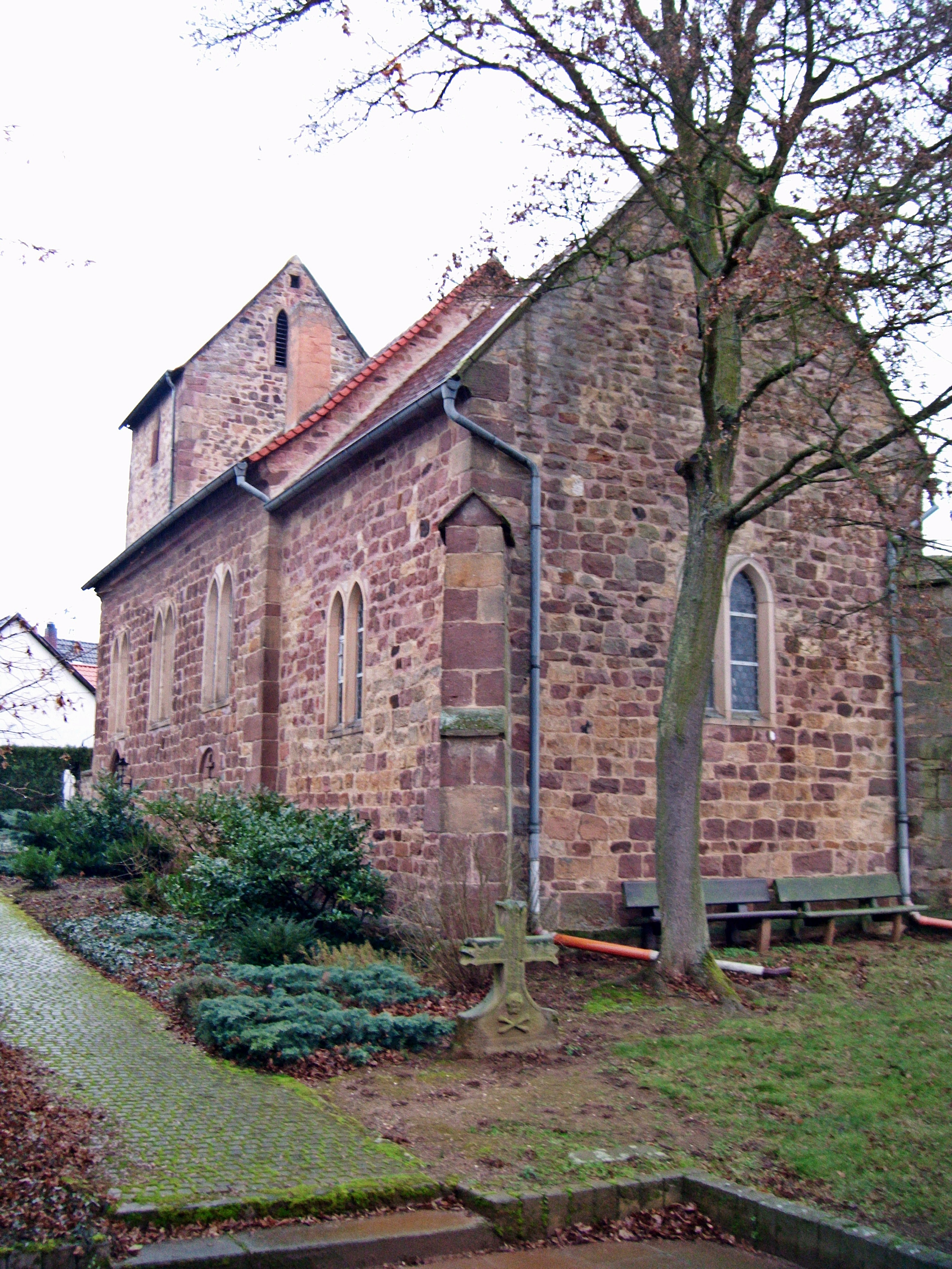 Prot. Martinskirche Battenberg, um 1200, ehemalige Eigenkirche der Abtei Glandern in Lothringen. Aufgenommen von Südosten.